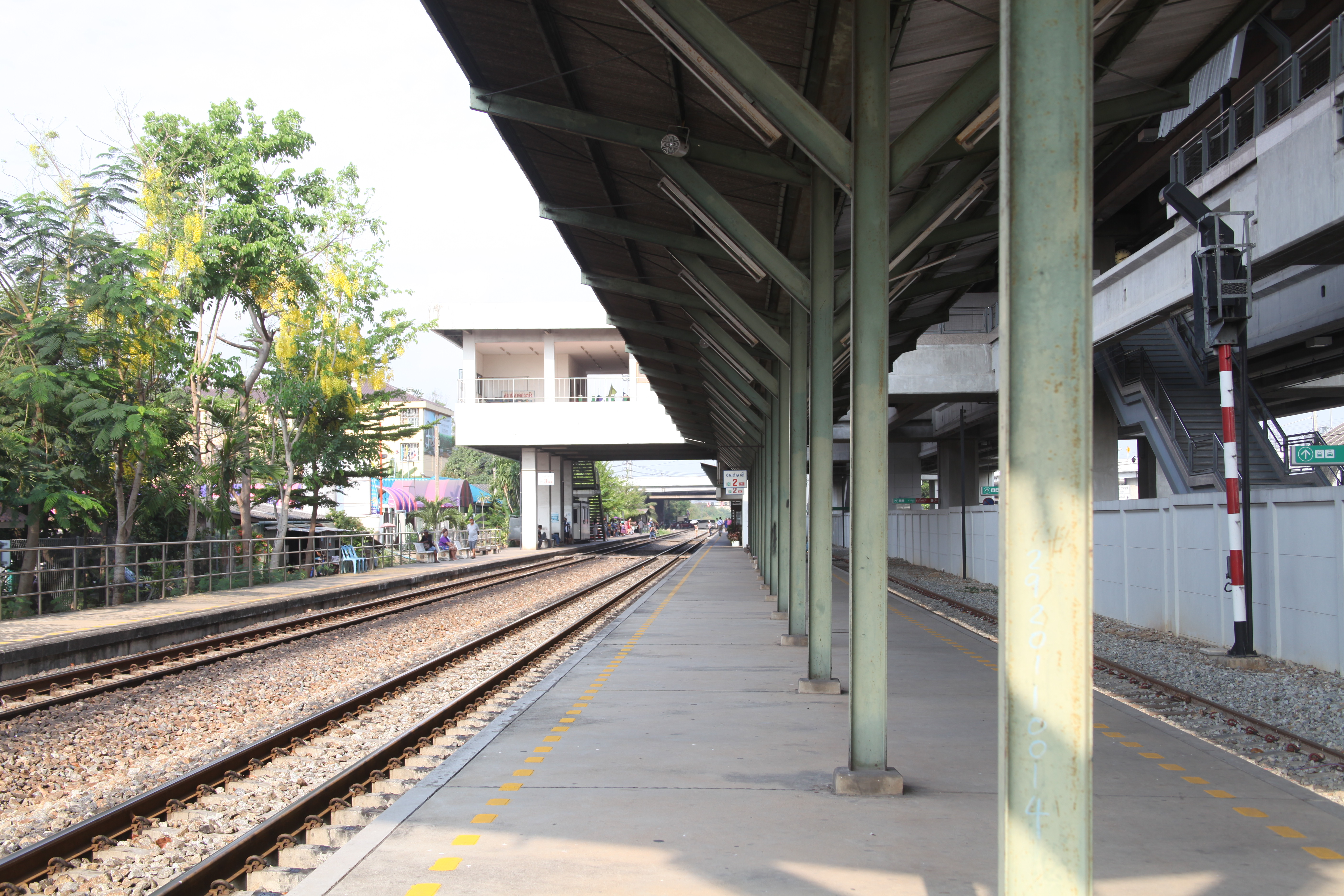 ラートクラバン駅